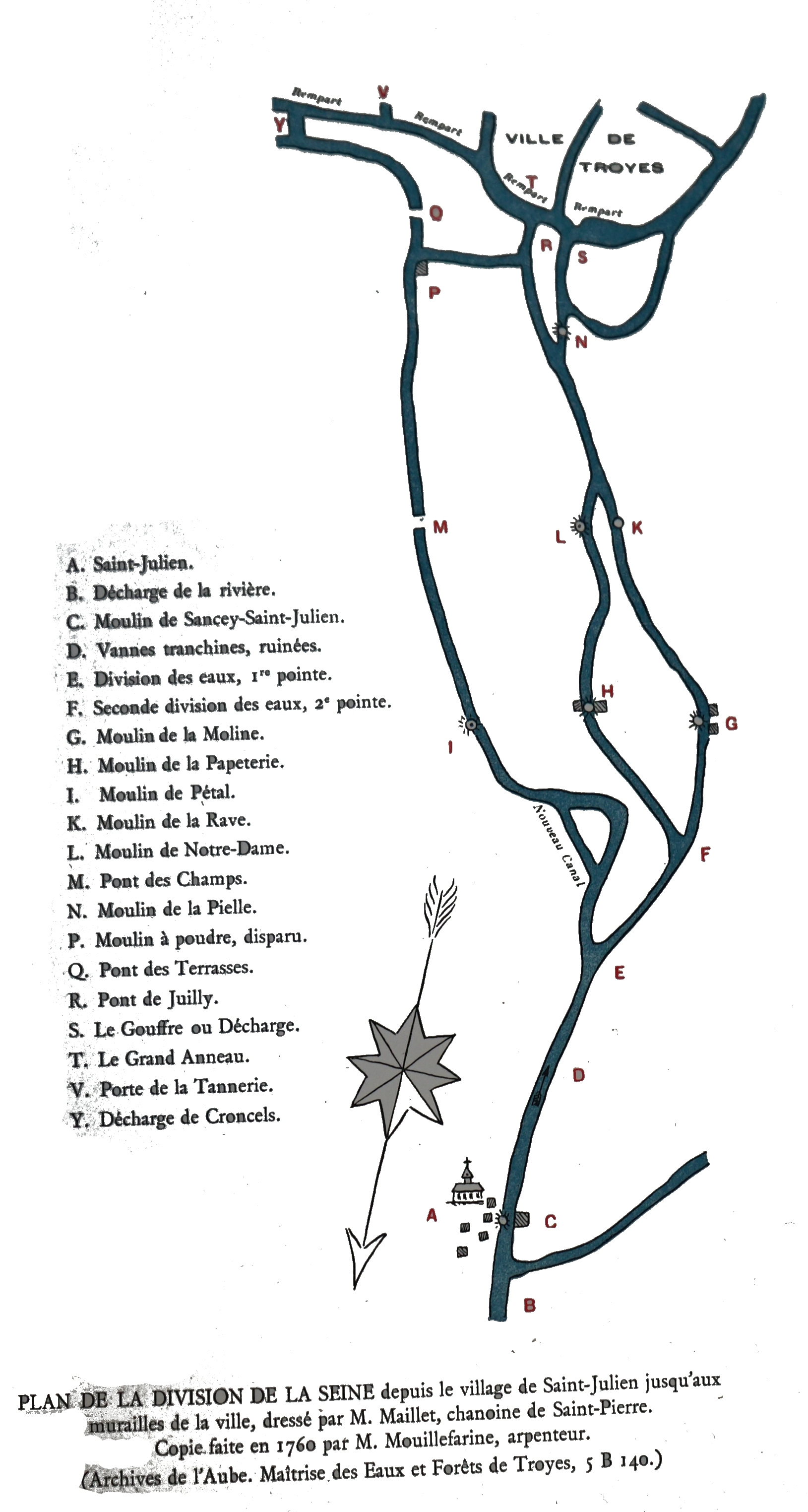 Moulins en amont de Troyes.